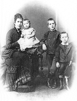 Julia Mann mit ihrer Tochter Julia und den Söhnen Heinrich und Thomas Mann um 1880